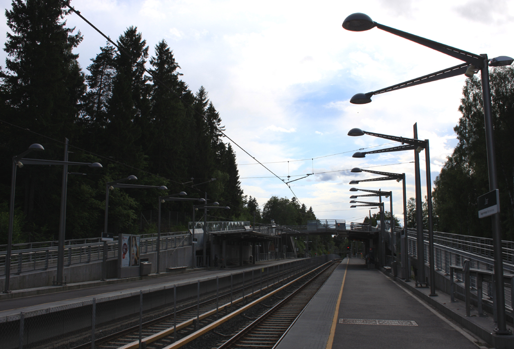 Jar T-banestasjon sett fra øst-vestgående plattform.